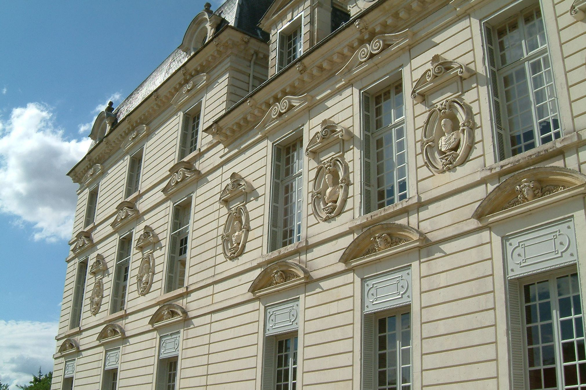 Château de Cheverny, France, détail de la façade